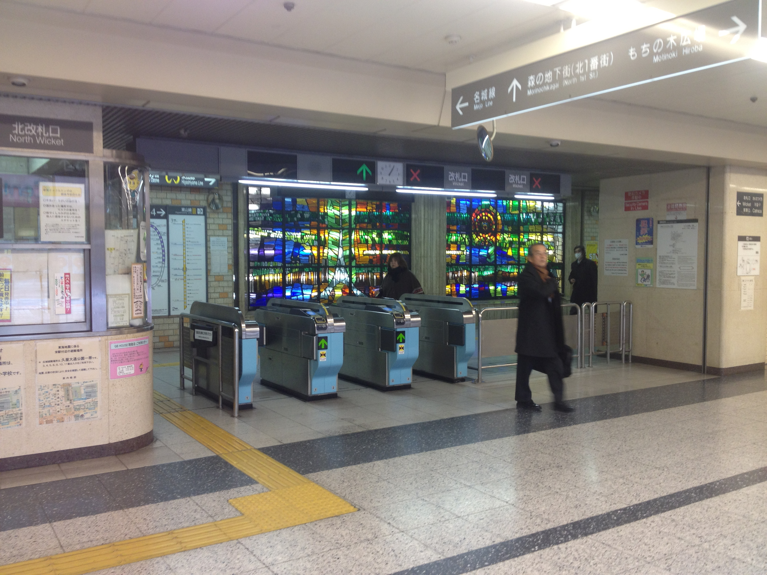 名古屋市営地下鉄栄駅 北改札口